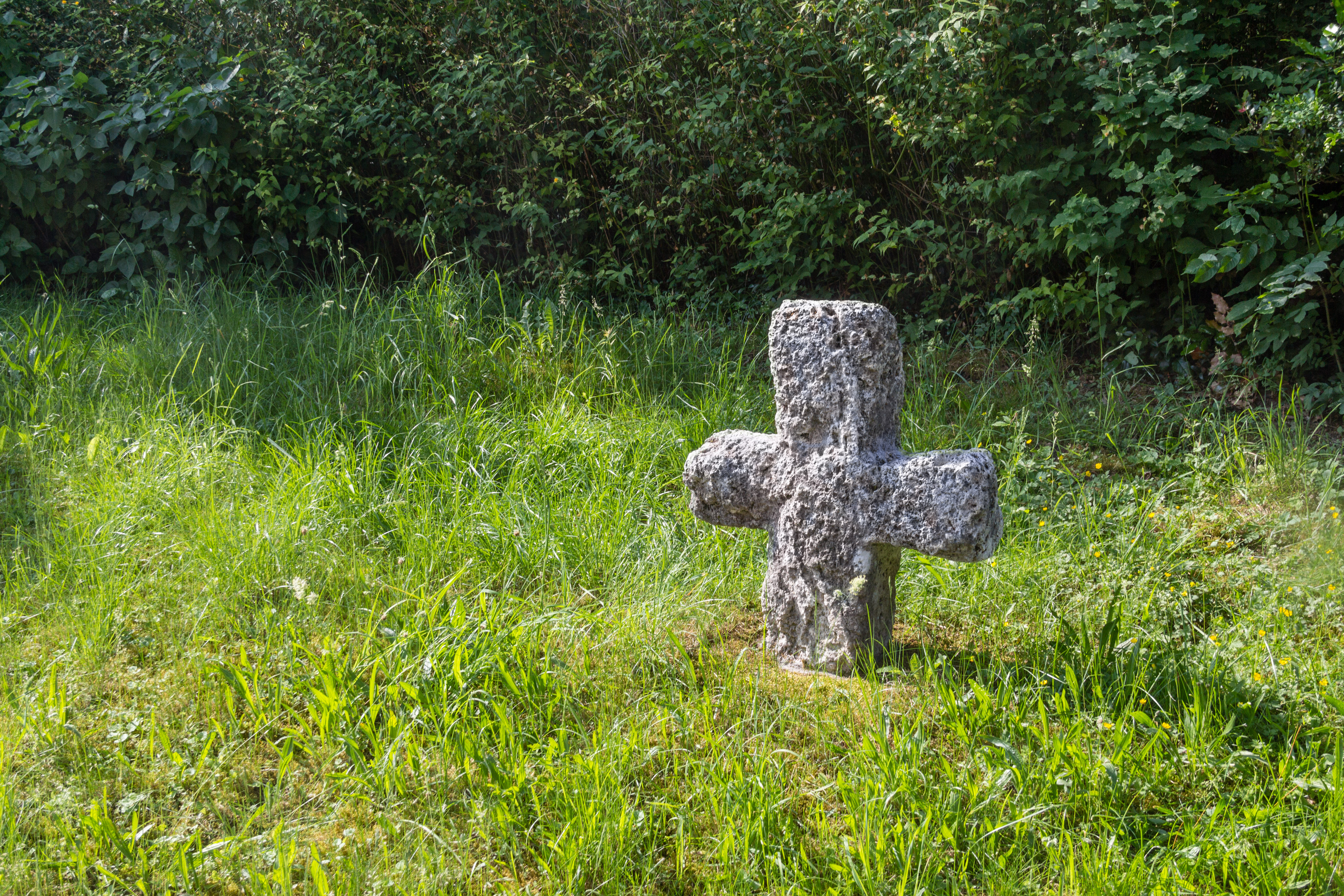 Steinkreuz, Engelhardsberg, Baudenkmal, D-4-74-176-26